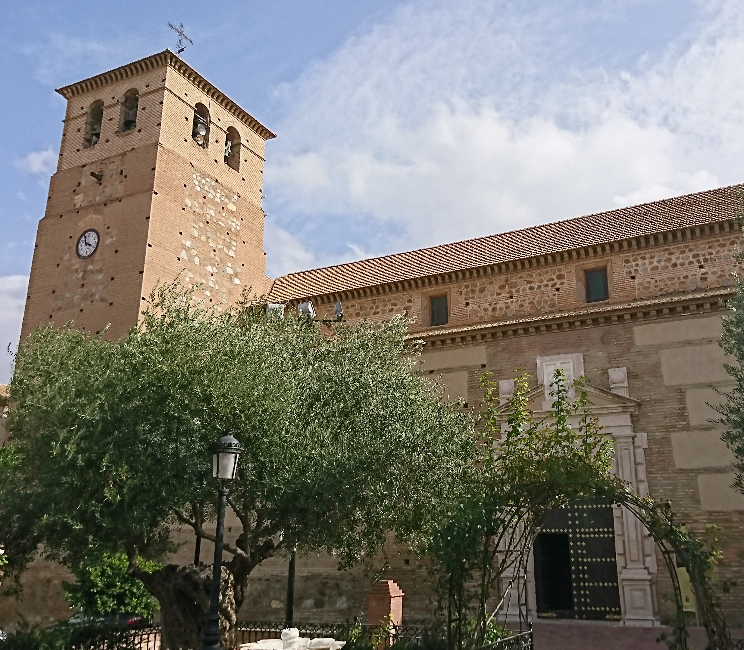 Iglesia Tabernas